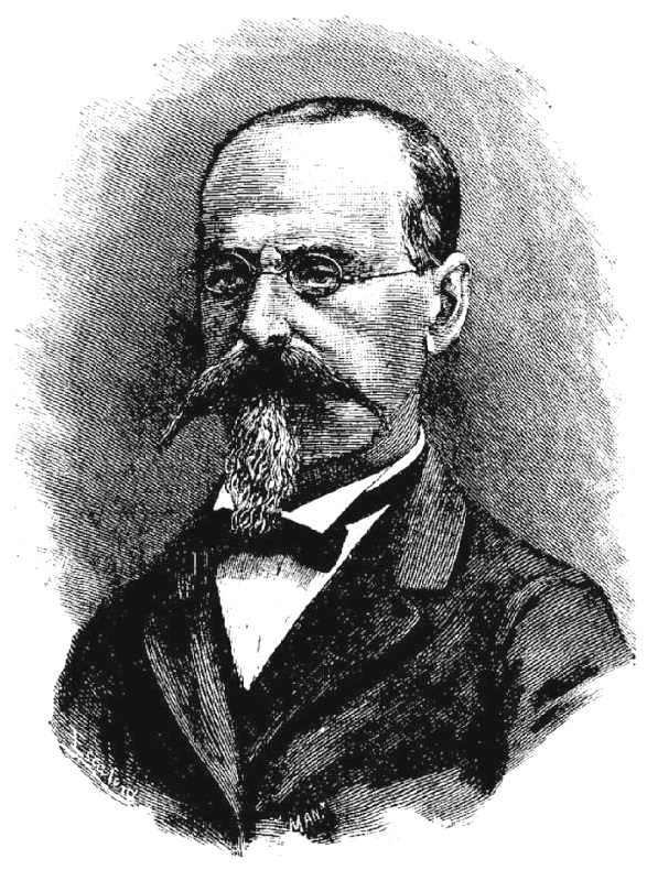 Antonio Valcárcel Quiroga